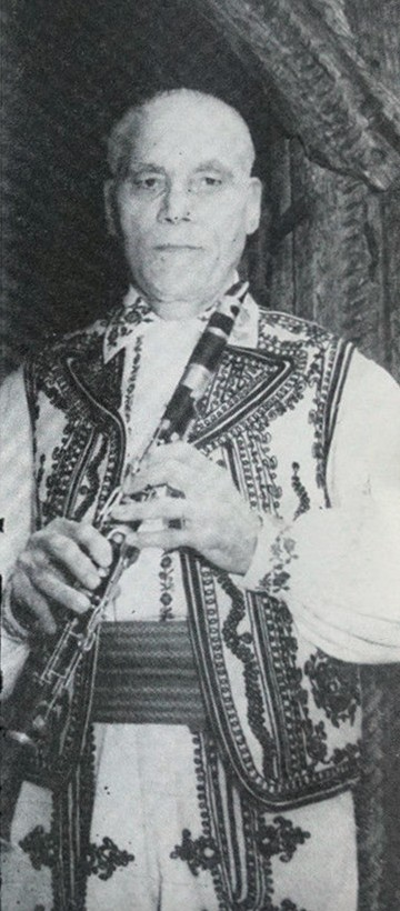 clarinetistul Iliuță Rudăreanu